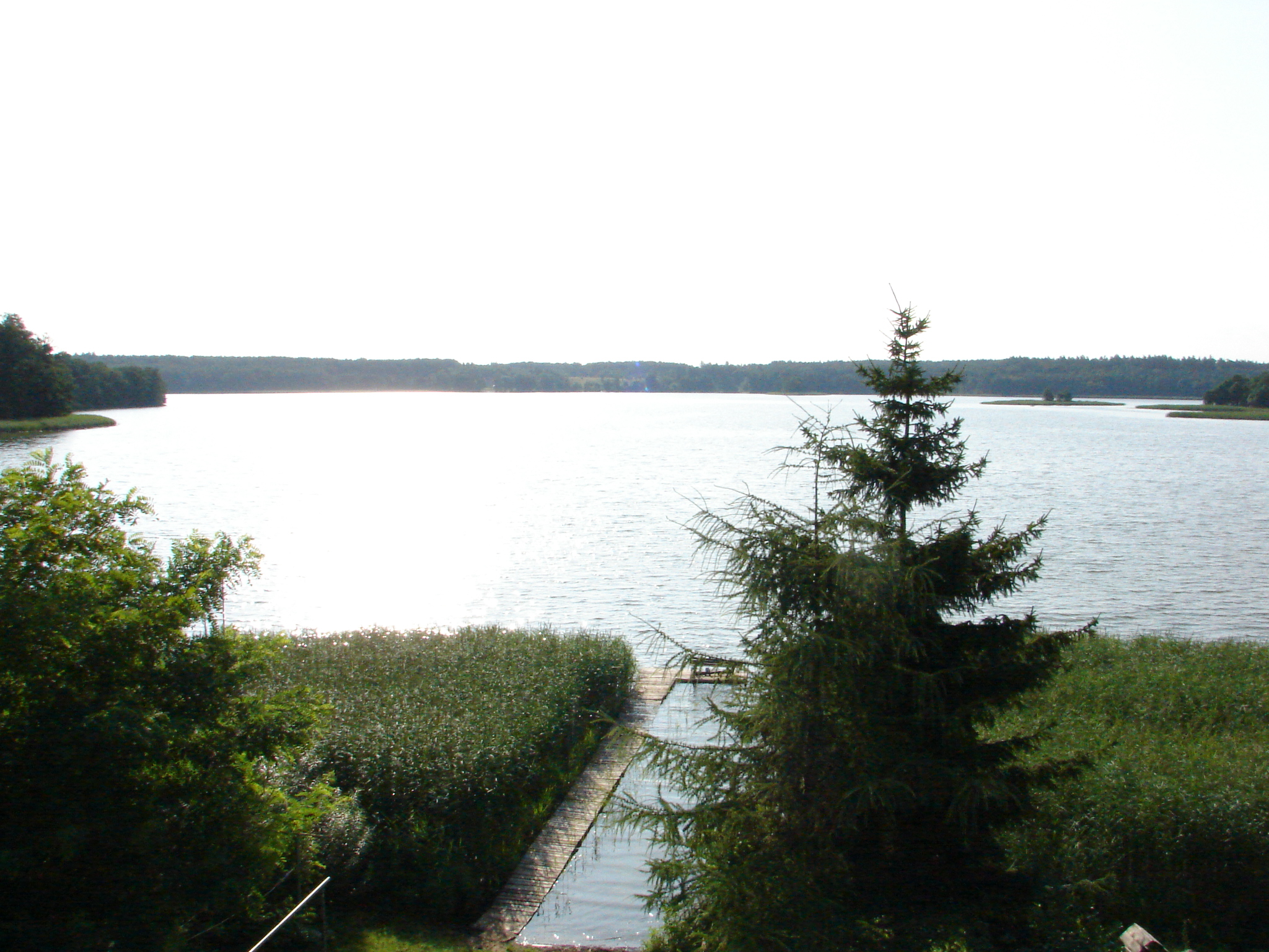 Pustniki 1